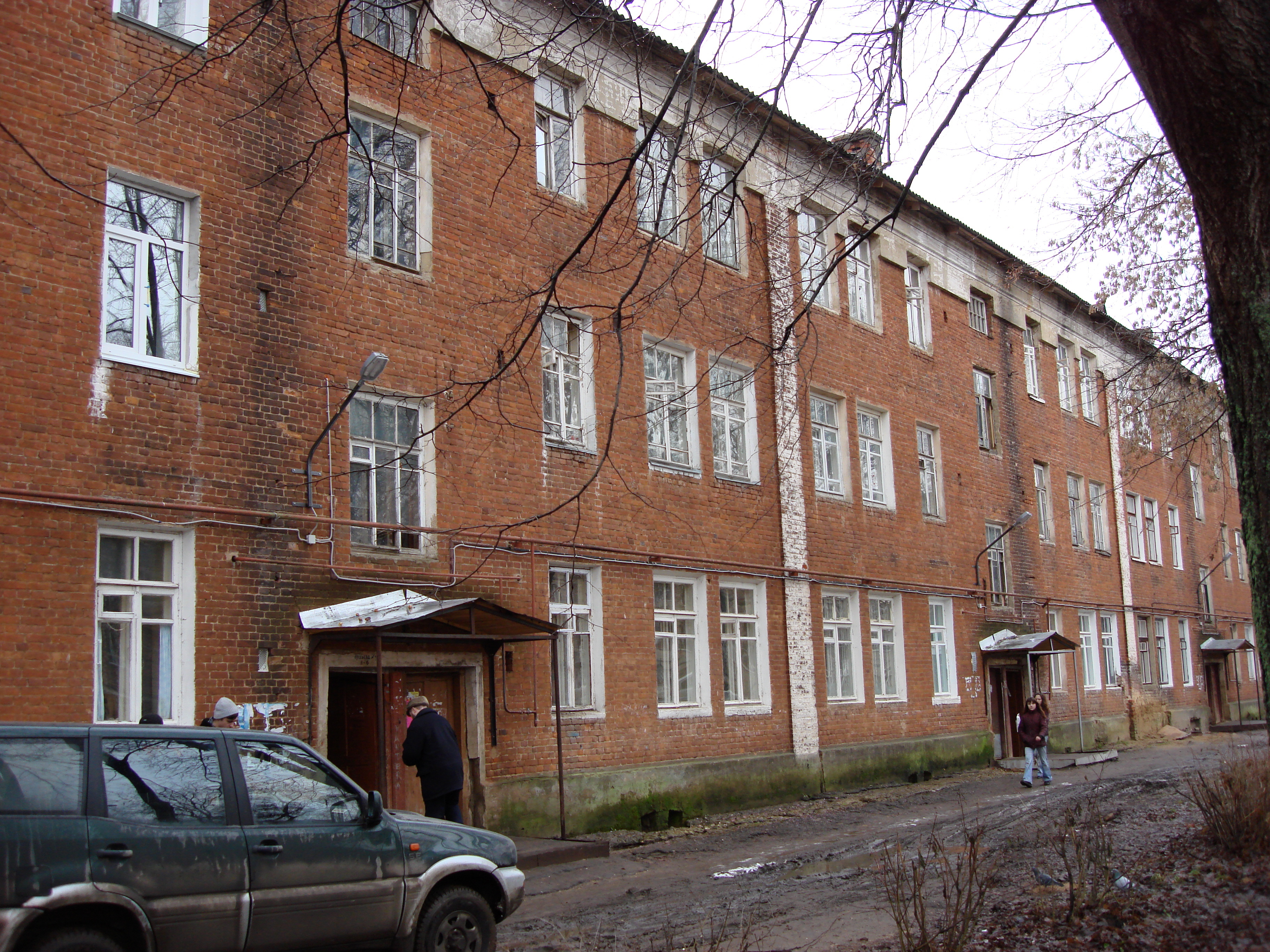 Дом в Высоковске, в котором жила семья Новожиловых